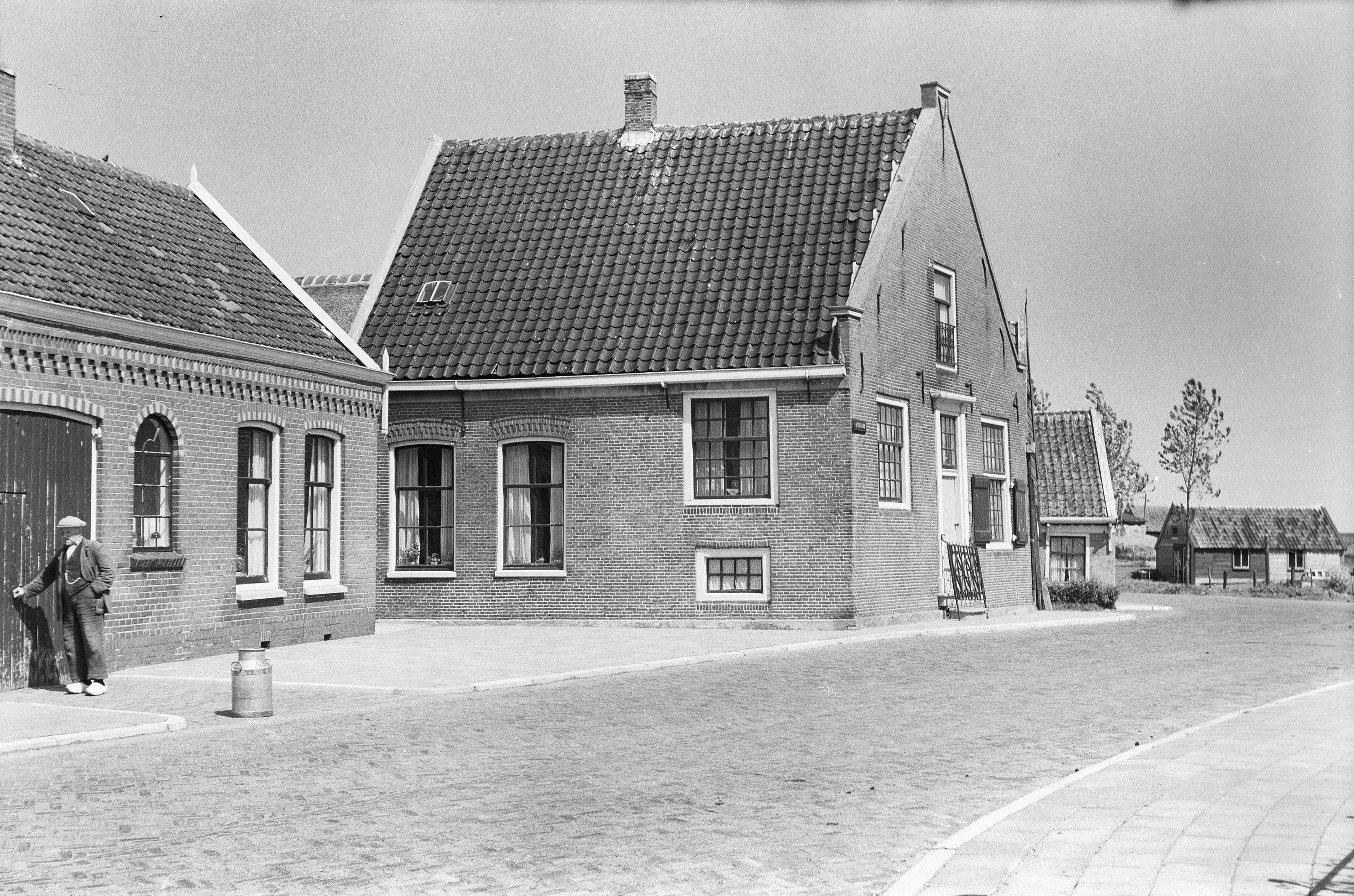 voor- en zijgevel